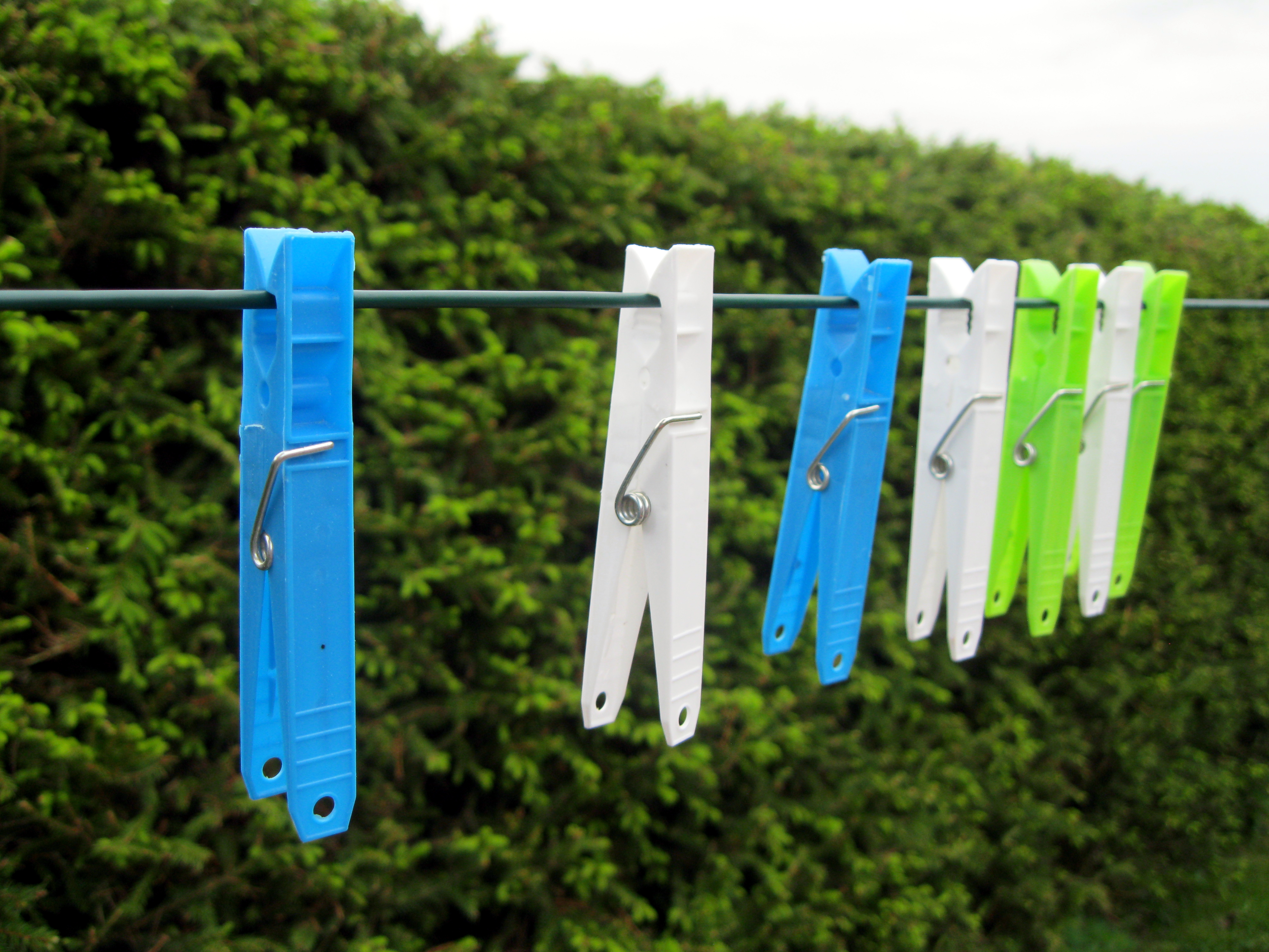 Pyykkipoikia roikkumassa narulta.